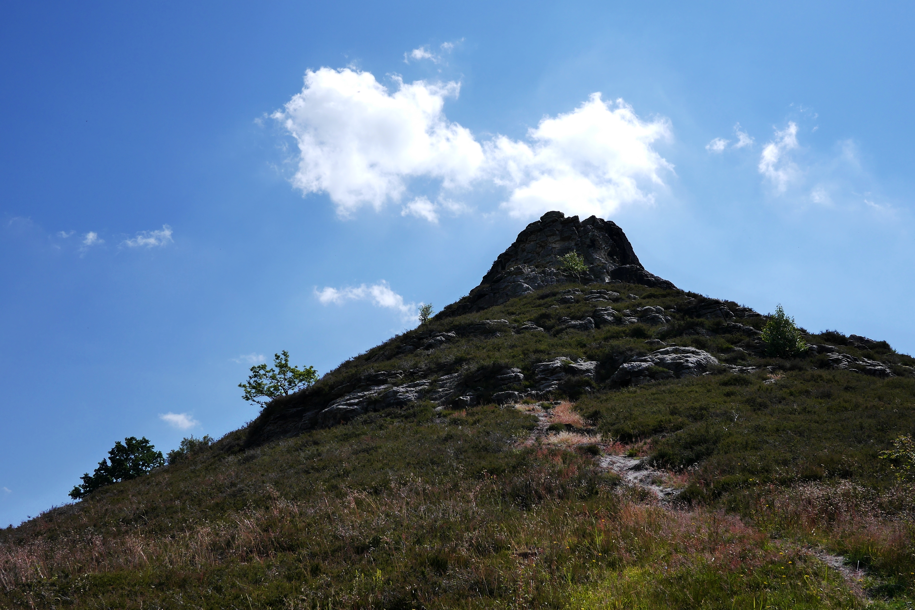 Teil der Thekenberge südöstlich von Halberstadt; oder doch ein Vulkan?